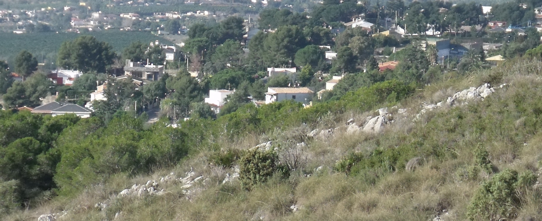 Urbanización Cumbres de Calicanto, en el municipio de Torrrente. Otras partes de la urbanización pertenecen a Chiva y Godelleta.